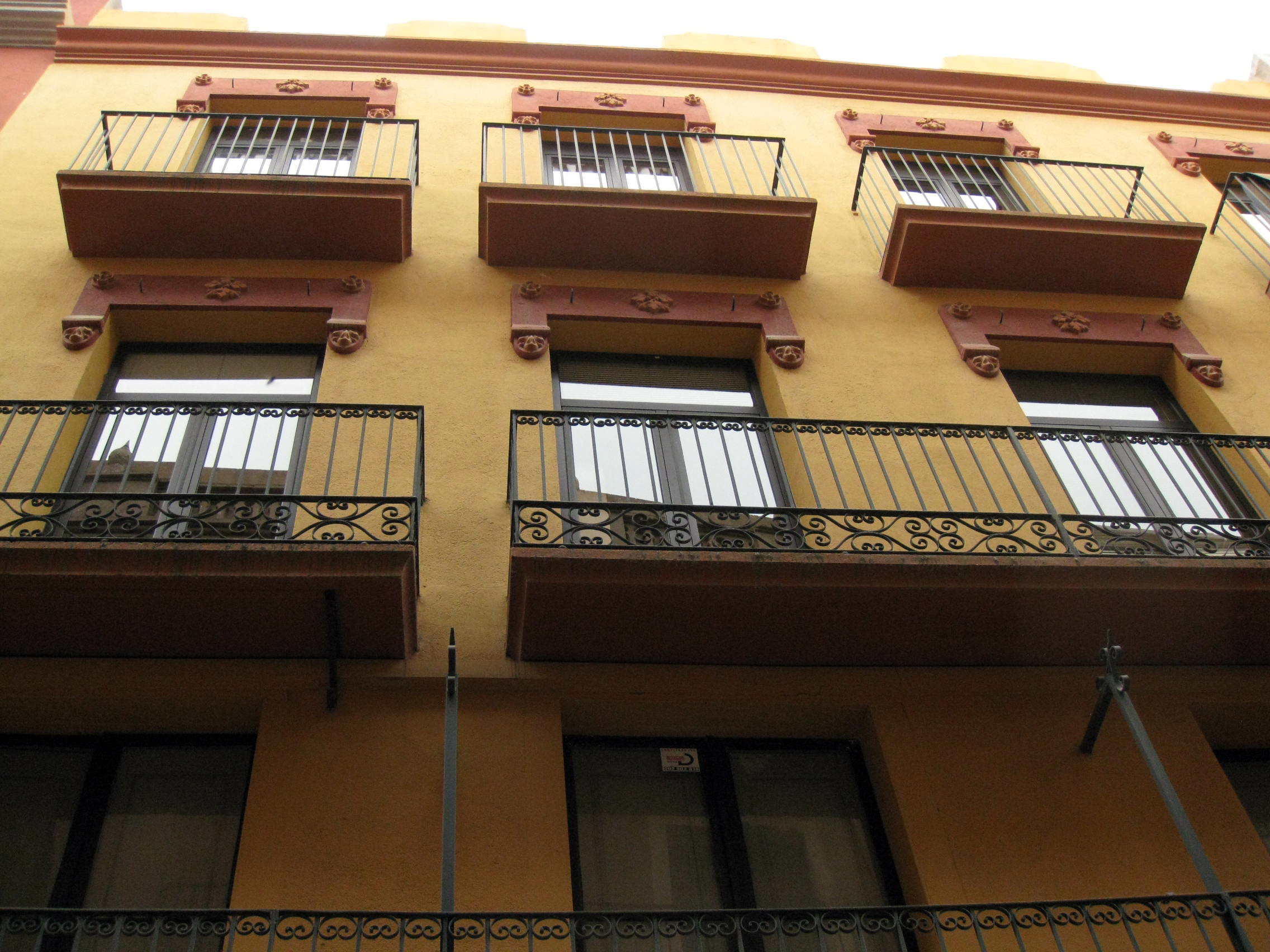 Casa al carrer Joan Maragall, 3 (Figueres)